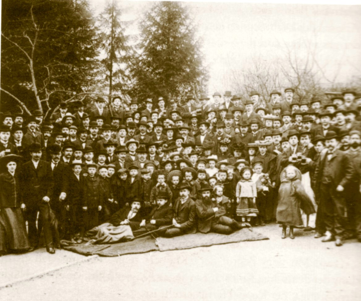 Foto Maifeier der SPD Bielefeld 1905